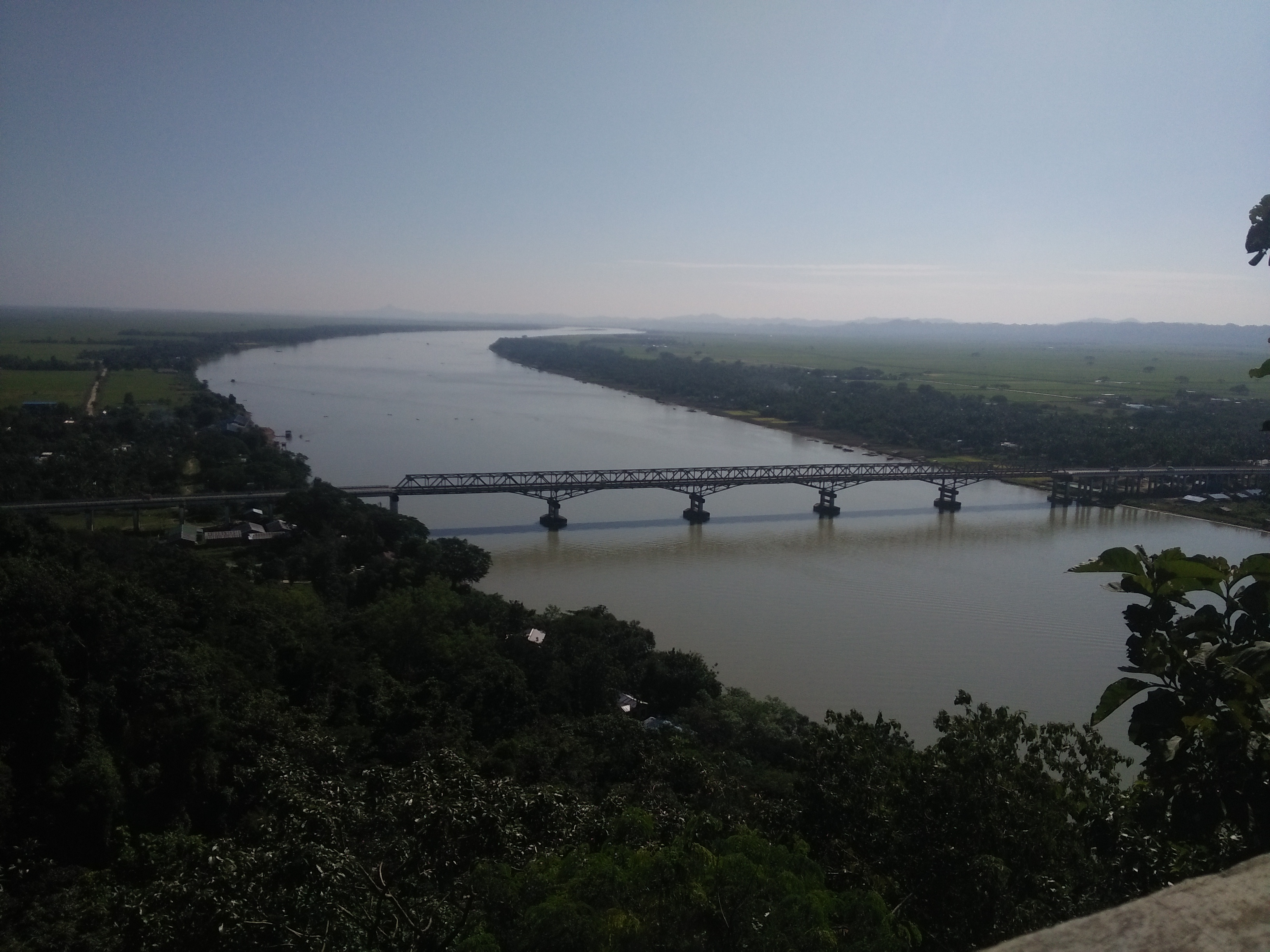 မြန်မာဘာသာ: ရခိုင်ပြည်နယ်တွင်းက လူသိများတဲ့ ကစ္စပ နဒီမြစ်ကို ကျောက်တော် ခြေတော်ရာ ဘုရားကုန်းပေါ်က မြင်နေရတာပဲဖြစ်ပါတယ်။ အောက်မှာမြင်နေရတဲ့ တံတားဟာ ဤမြစ်ပေါ်က ရန်ကုန် စစ်တွေ တံတားပဲဖြစ်ပါတယ်